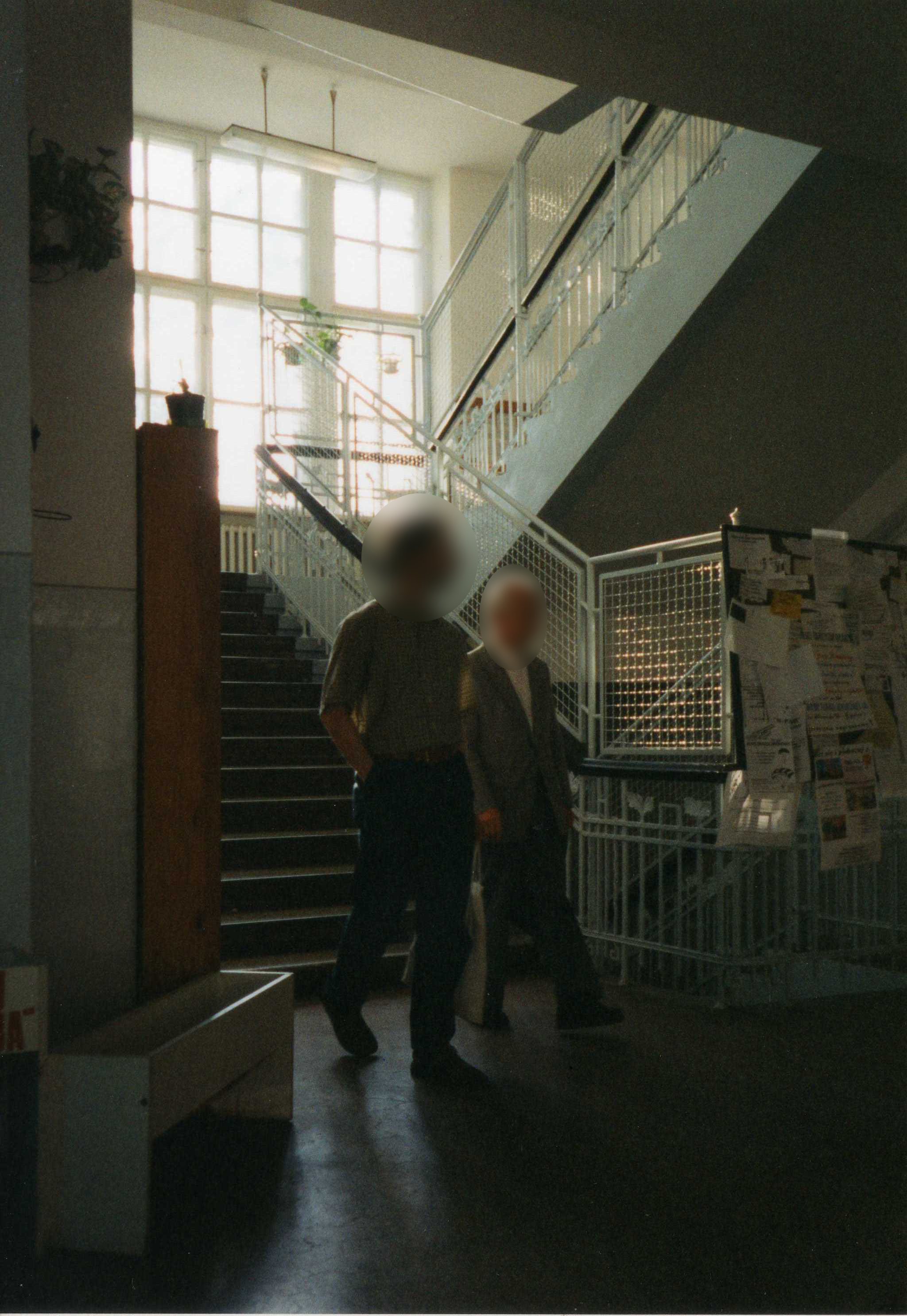 Treppenhaus hinter dem Haupteingang des als LDG erbauten Gebäudes, Zustand 1998